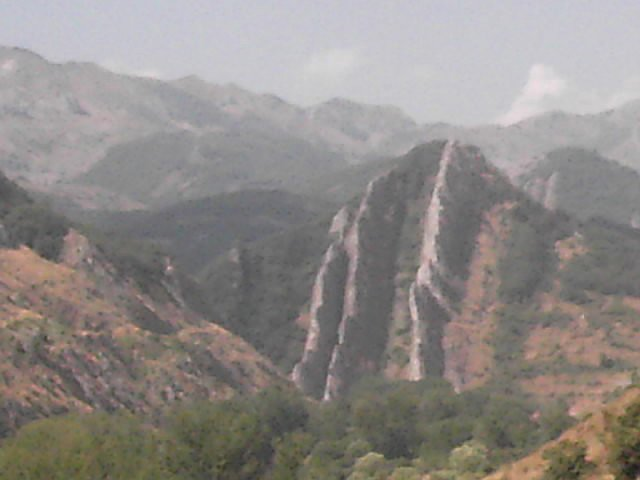 Calizas coralinas. Capas de calizas y lutitas en posición totalmente vertical. Relieve alpino. Vista desde la carretera de Vega de Gordón -La Pola de Gordón (León)-, España.